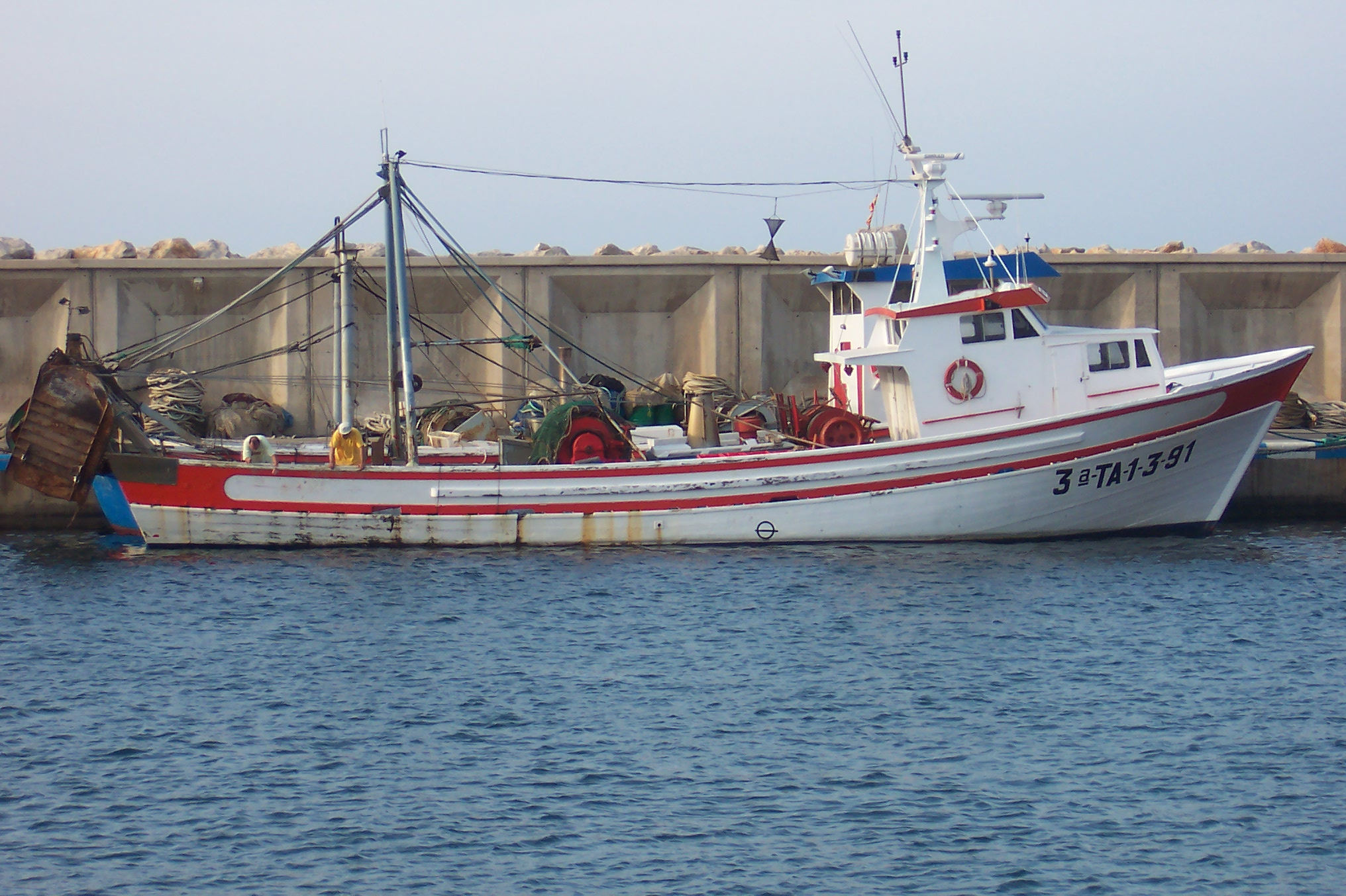 Vaixell d'arrossegament Arrastrero de popa